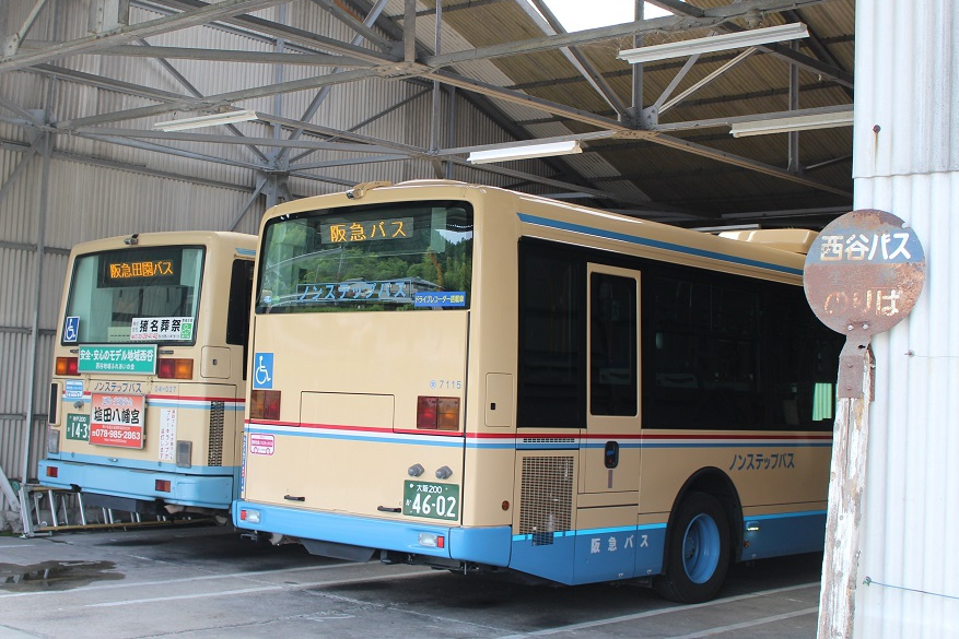 バスとバス停 阪急田園バス本社車庫